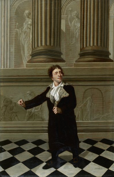 Портрет на делегатот Жан-Пол Мара од сликарот Жозеф Боз (72,5 x 47,5), 19-ти век